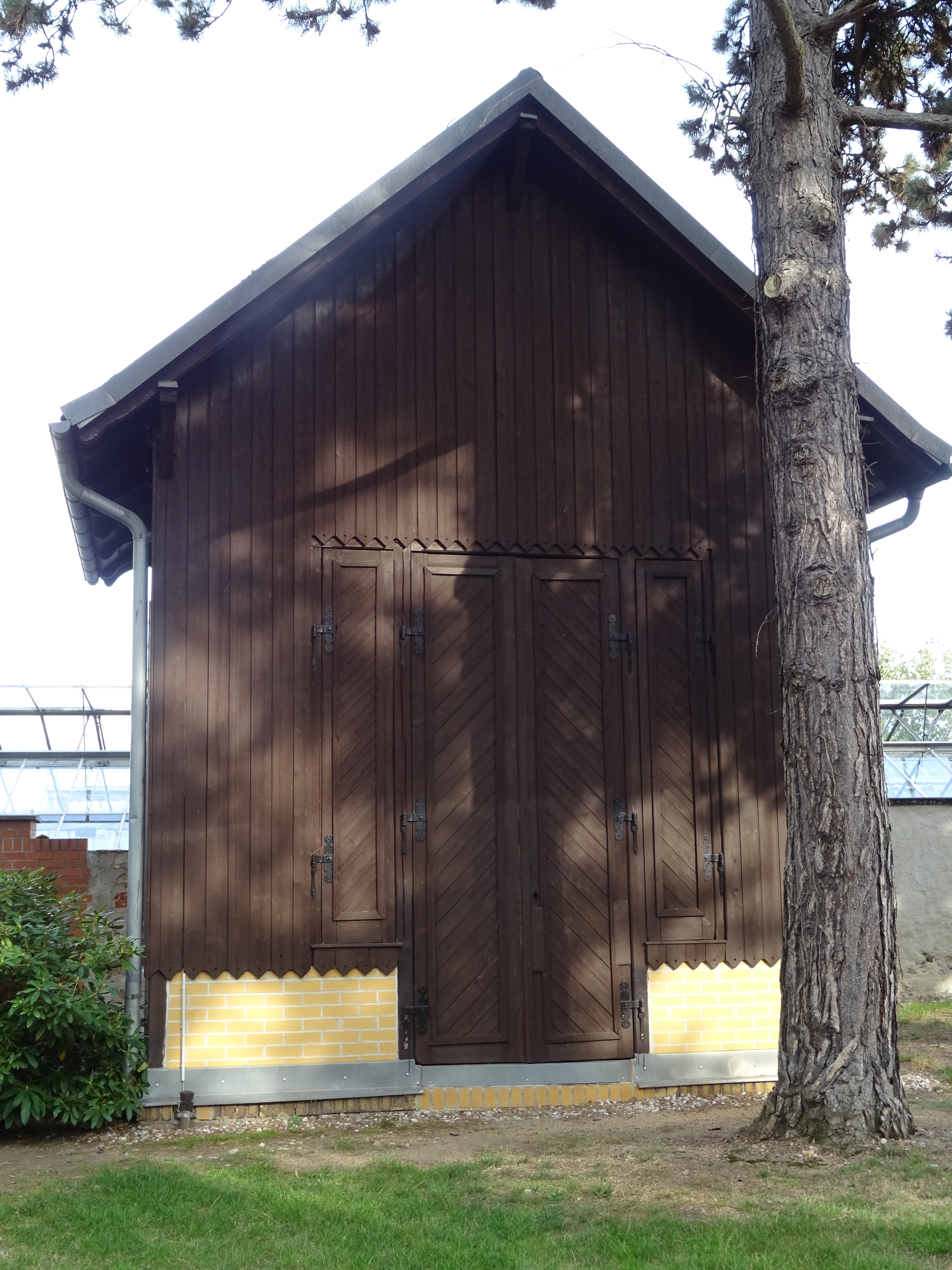 Friedhofskirche Heilig Kreuz in Grimma. Von 1556 bis 1559 erbaut. 1607 umgebaut und 1910 erneut umgebaut und erhöht. Mit historischen spätgotischen Flügelaltar (entstanden um 1519) stammt aus der 1888 abgerissenen Grimmaer Nicolaikirche. Er enthält reich ausgestattete Schnitzwerke und Bilder aus der Cranachschen Schule. Das Glockenhaus.